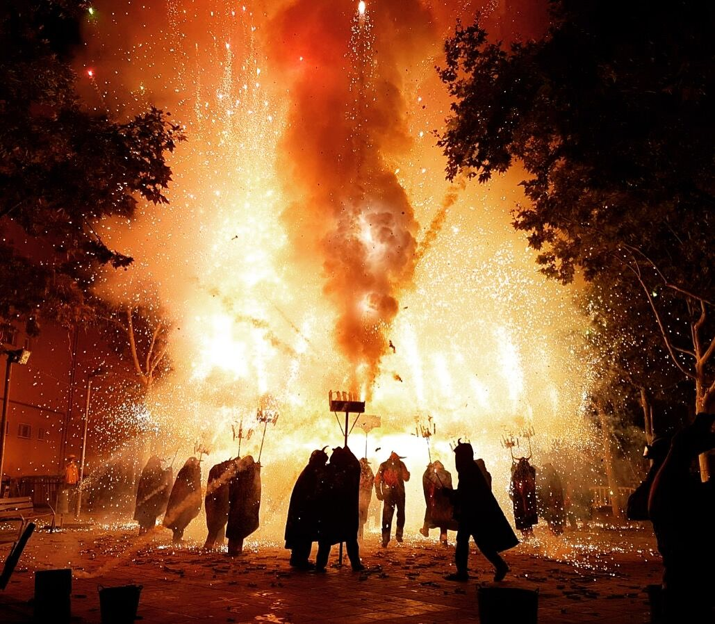 Encesa final 2018